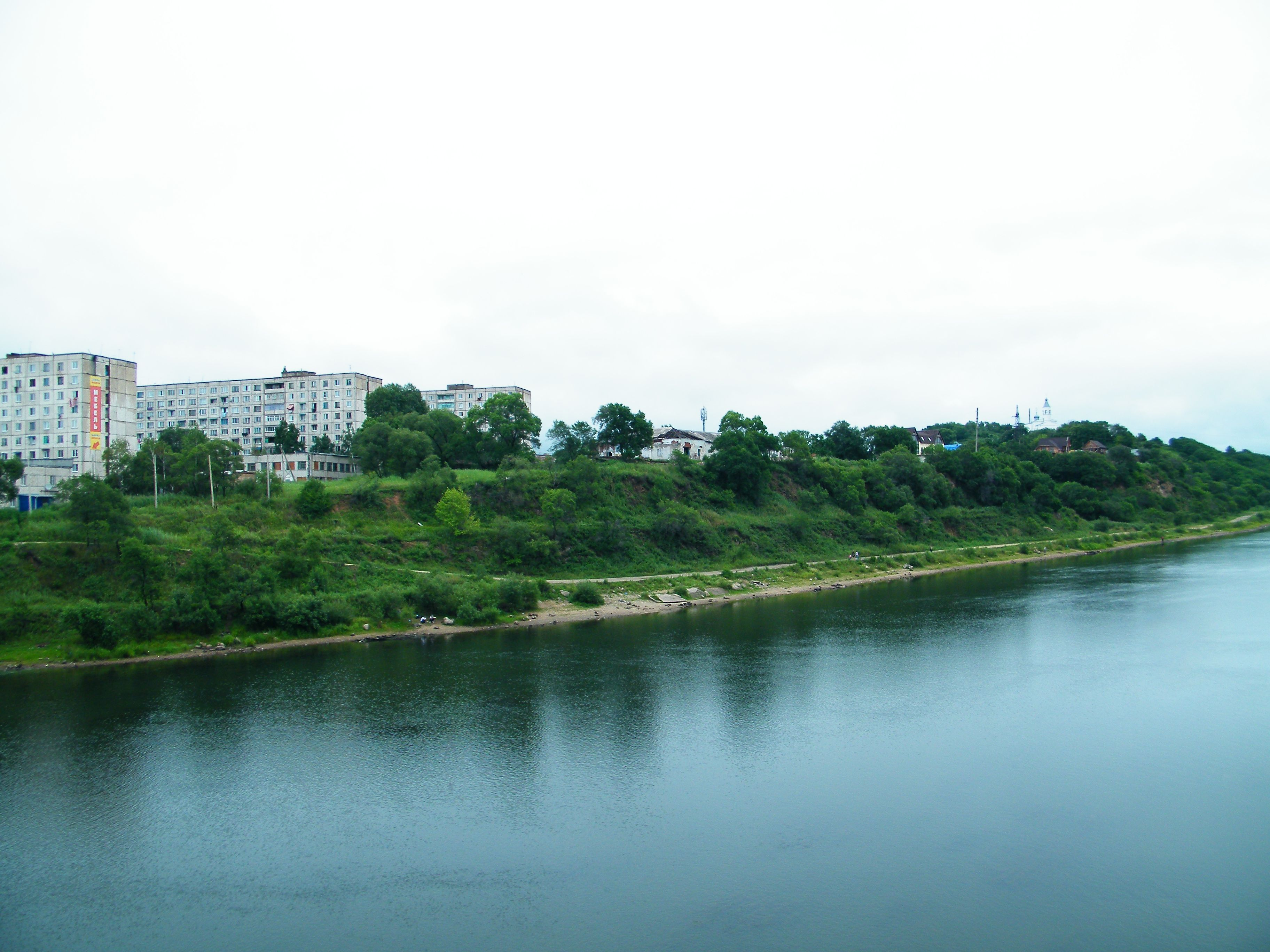 Река Уссури в Лесозаводске